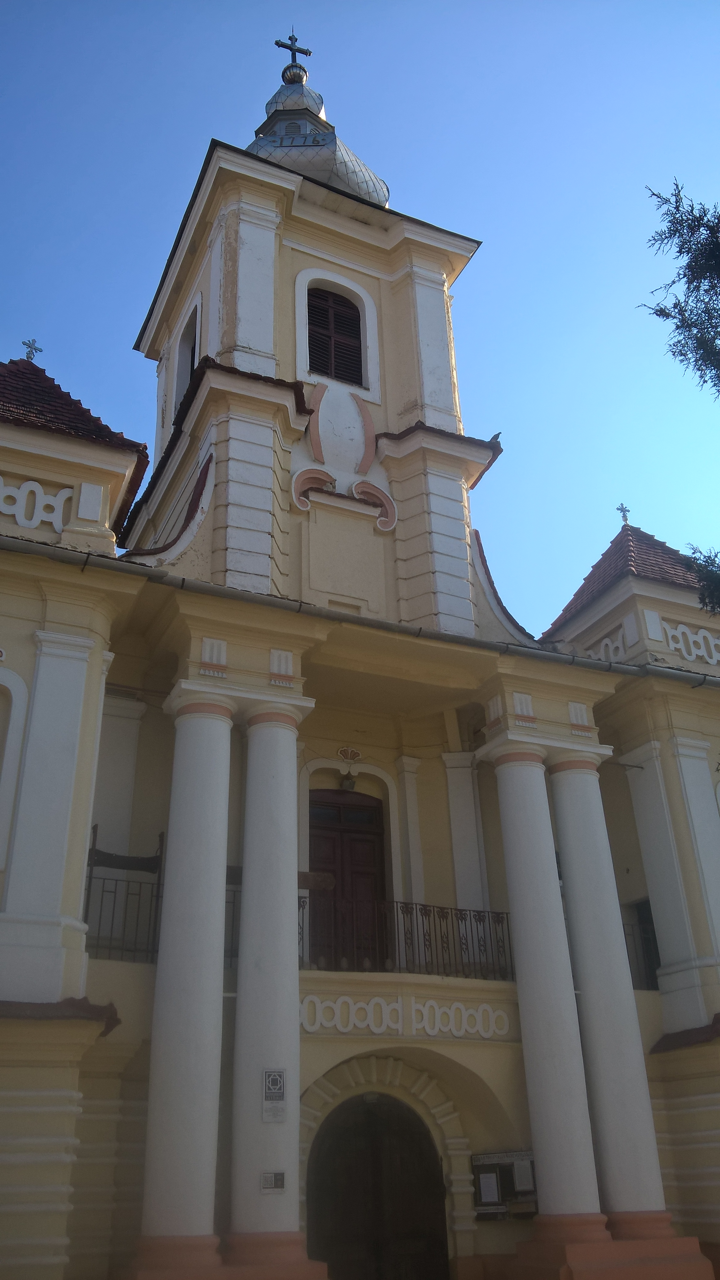 Biserica „Sf. Apostoli Petru și Pavel” 01